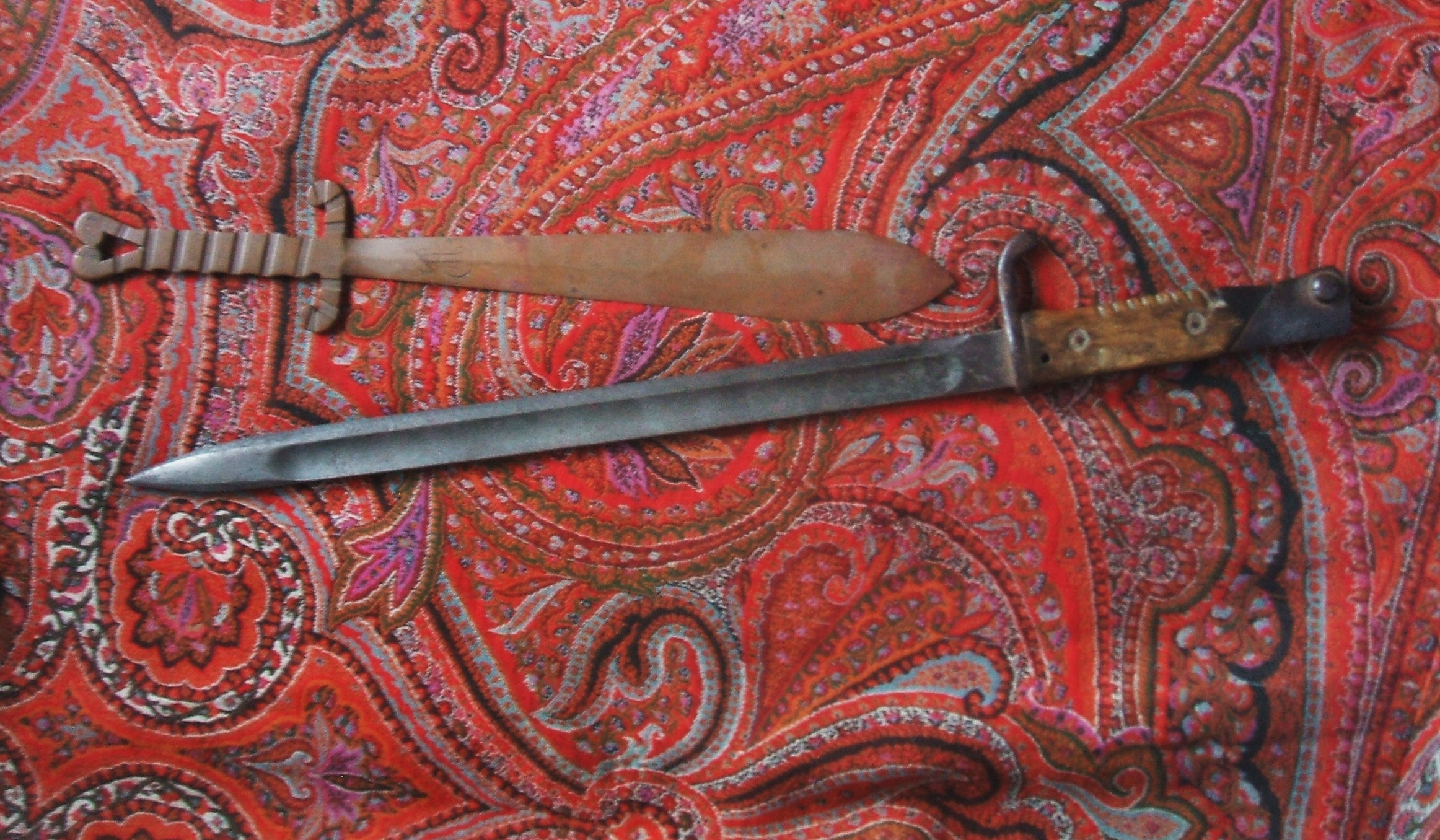 Coupe-papier (artisanat de tranchée de la guerre de 1914-1918, signé d'un EM pour Edmond Miniac, 1884-1963, avocat-général à la cour de cassation). En bas, baïonnette allemande d'un fusil Mauser 98 de l'armée allemande (possession du capitaine de réserve Louis Miniac, 1887-1952, du 247ème régiment d'infanterie). Collections successives de la famille Miniac, Marie-Anne Miniac, Rennes, France.